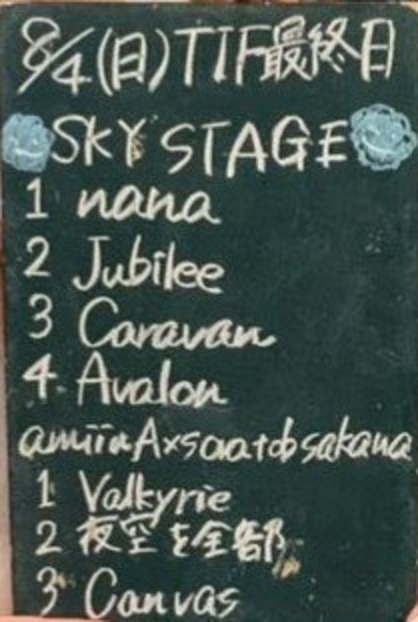 amiinAセトリボード